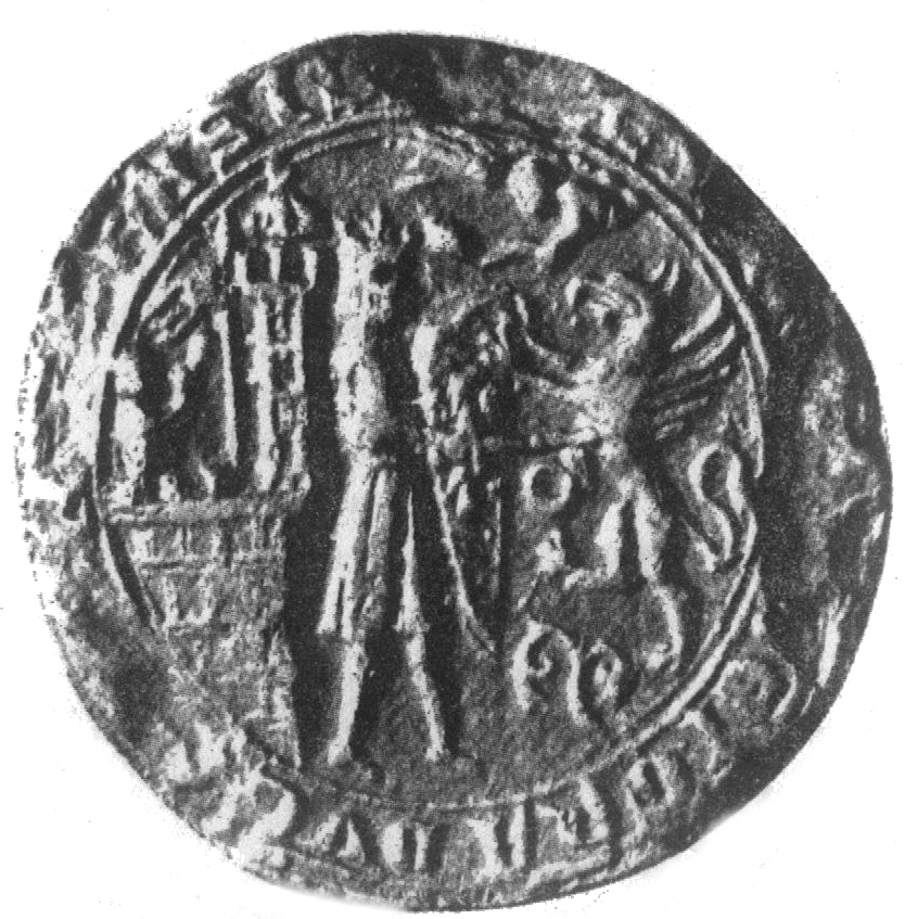 Leszek II Czarne